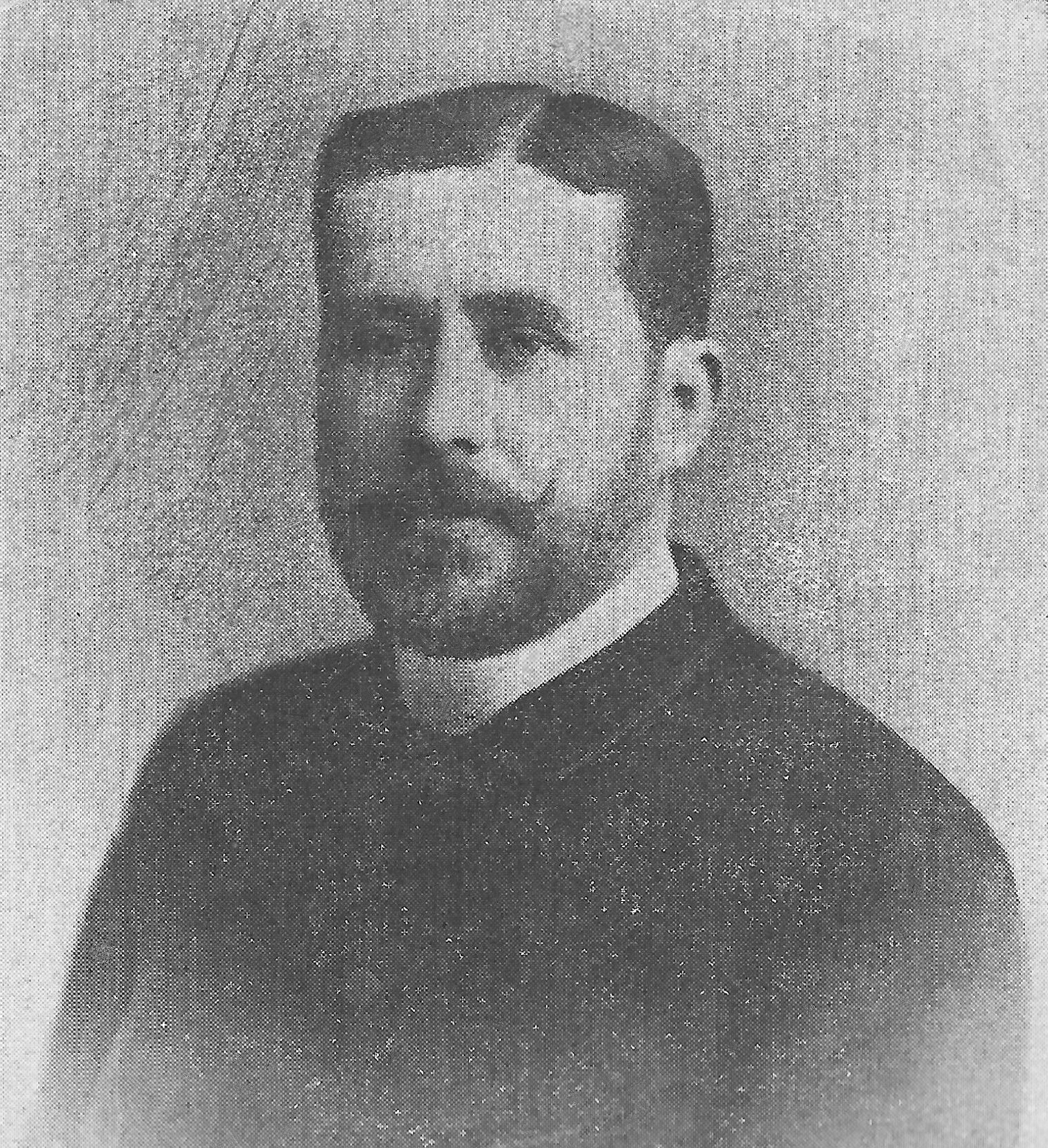 Fotografía de Manuel Ibarra y Cruz (1855-1913) diputado a Cortes por el distrito de Alcalá de Henares desde el 1 de febrero de 1891 hasta el 30 de abril de 1903, y desde entonces senador vitalicio.